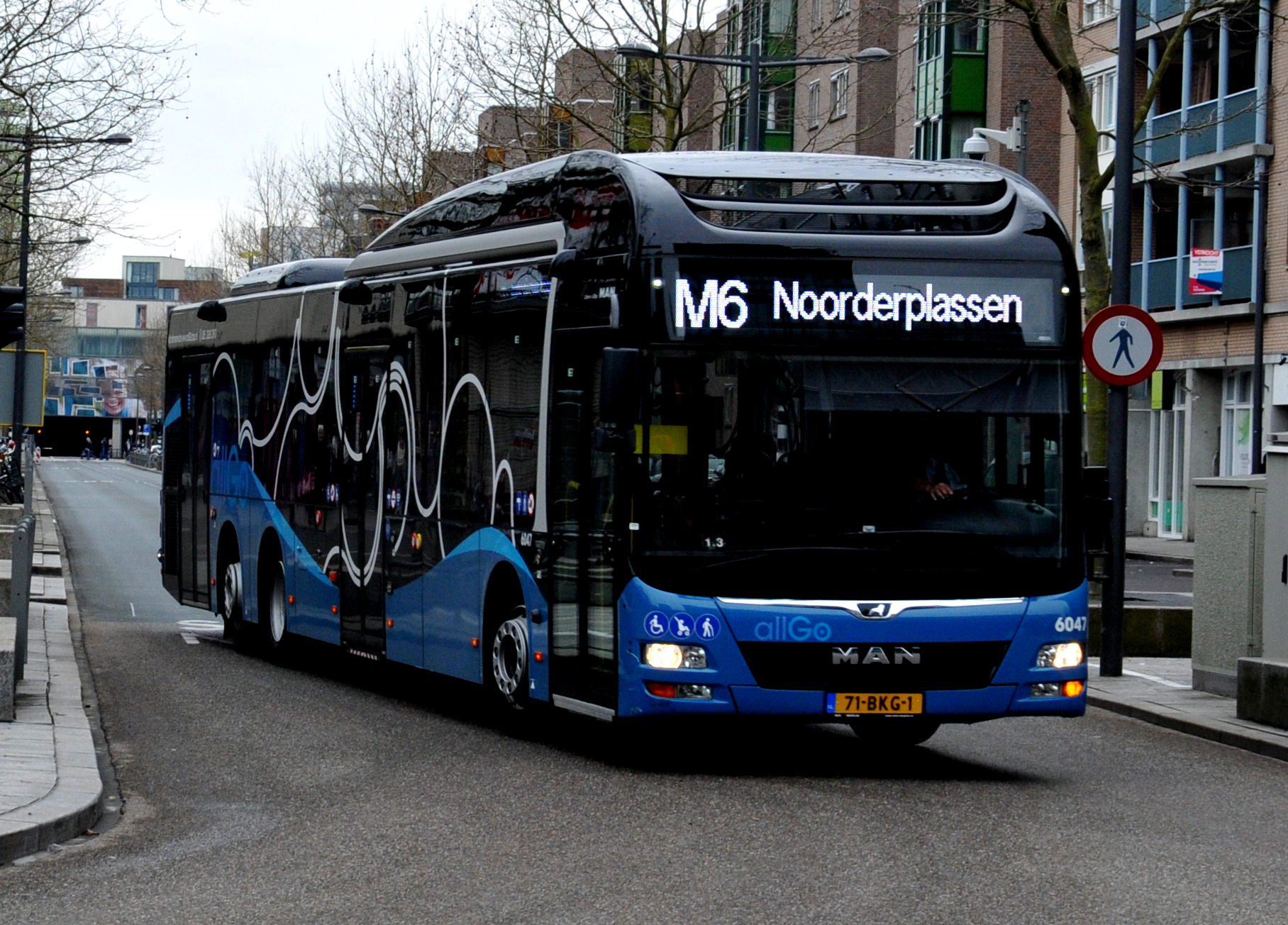 Keolis Nederland bus 6047 van het type MAN Lion City A26 LF te Almere.